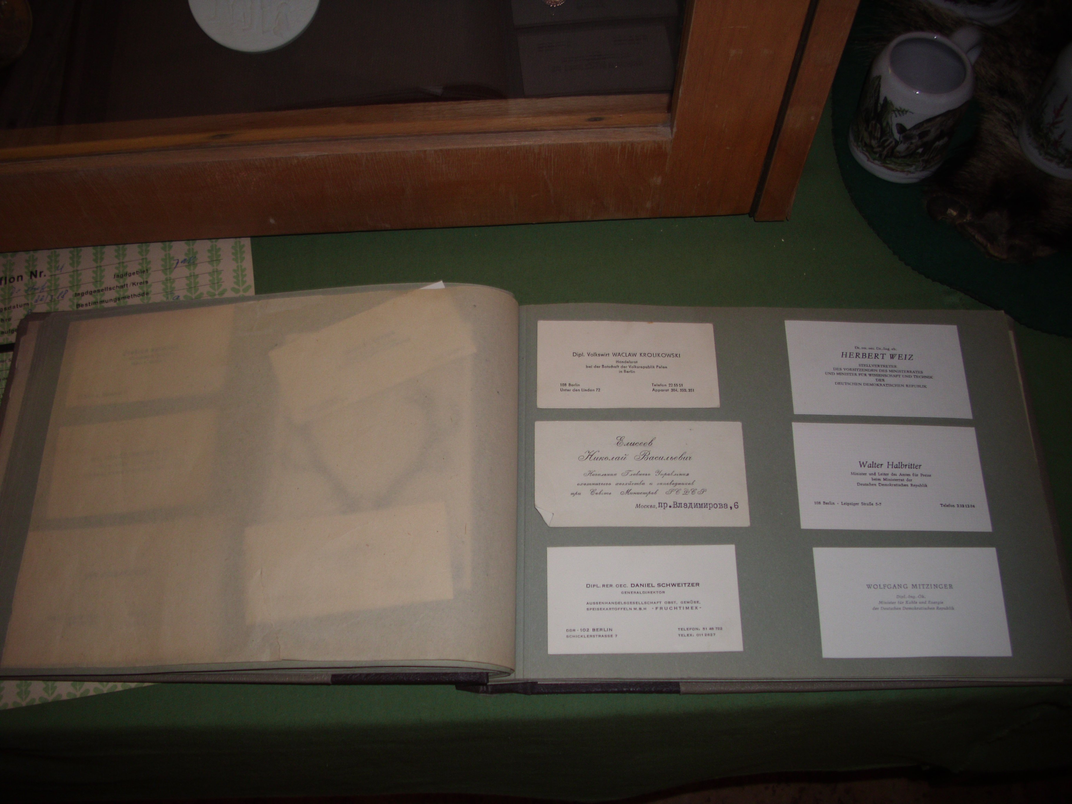 Sammlung von Visitenkarten der Staatsgäste bei Staatsjagden in der DDR, zur Verfügung gestellt dem Heidereiterei- und Forstmuseum Dammendorf, Brandenburg